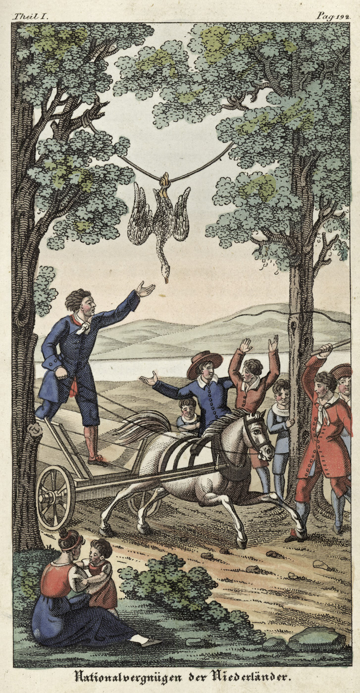 Nationalvergnügen der Niderländer, aus: Felix Selchow (= J. H. Meynier): Europa's Länder und Völker. Ein lehrreiches Unterhaltungsbuch für die gebildete Jugend. Berlin, Amelang, 1822.